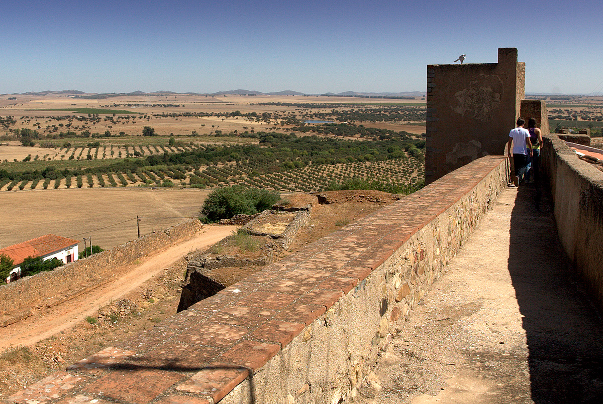 Muralhas do castelo de Ouguela